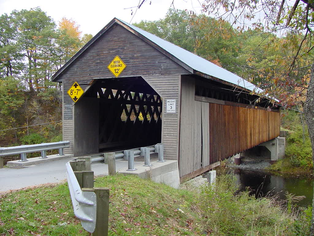 New Hampshire Covered Bridge Luiz Felipe Castro